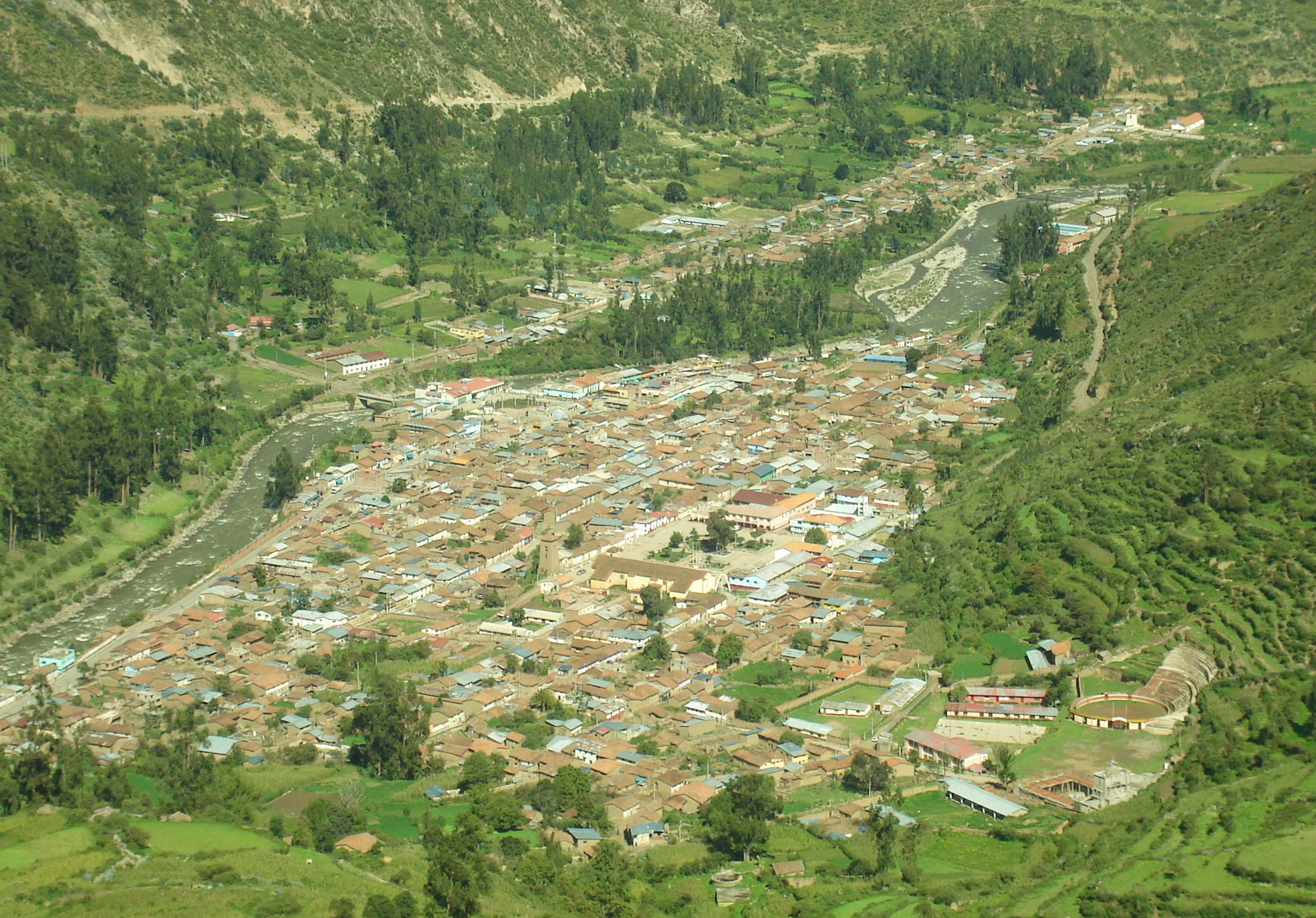 Vista Panoramica de Chalhuanca